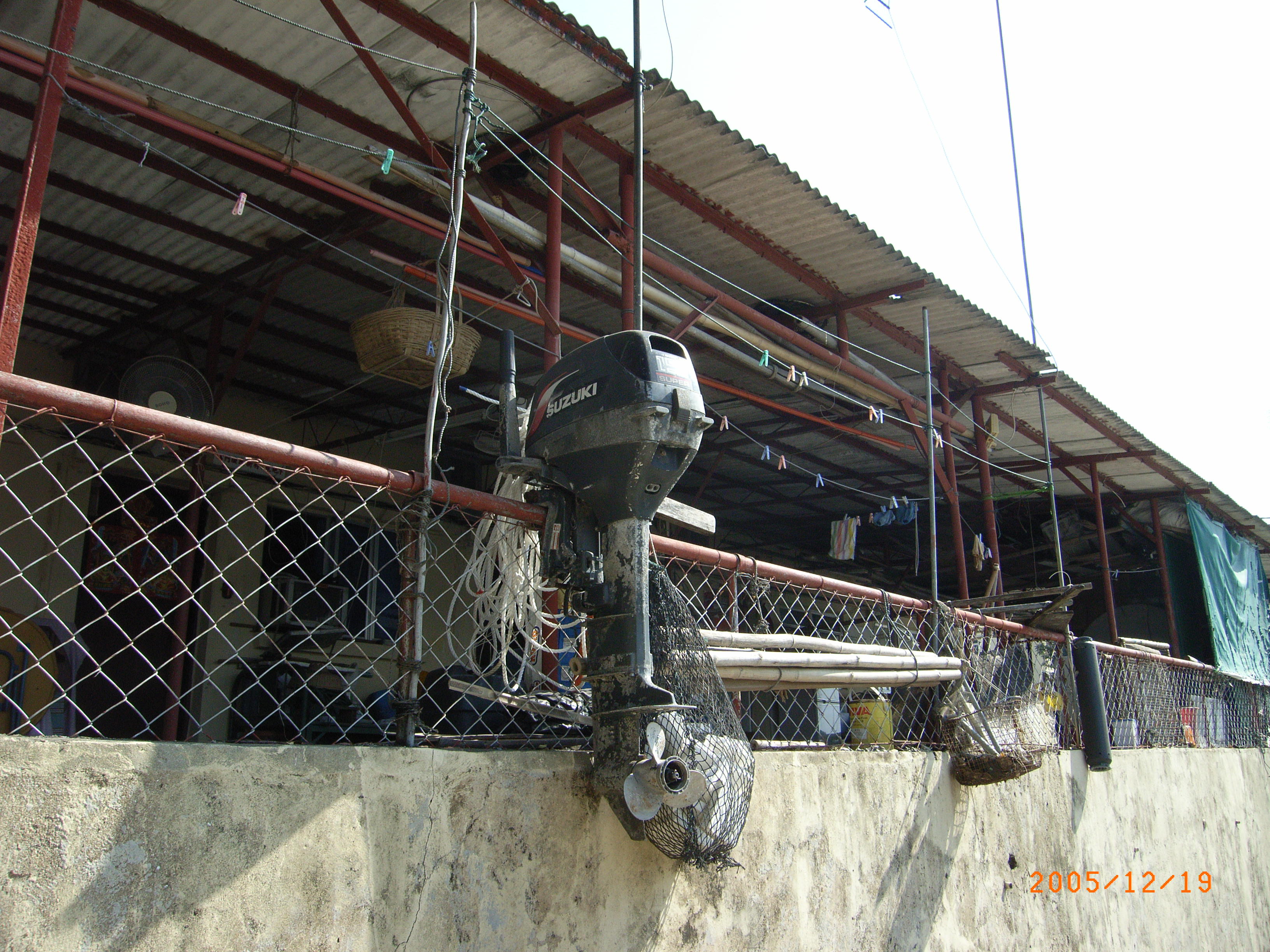 中文（香港）: 塔門漁民村2005_2